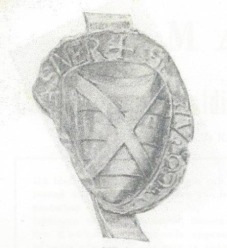 Zegel met wapen Dirk I van Wassenaer 1226